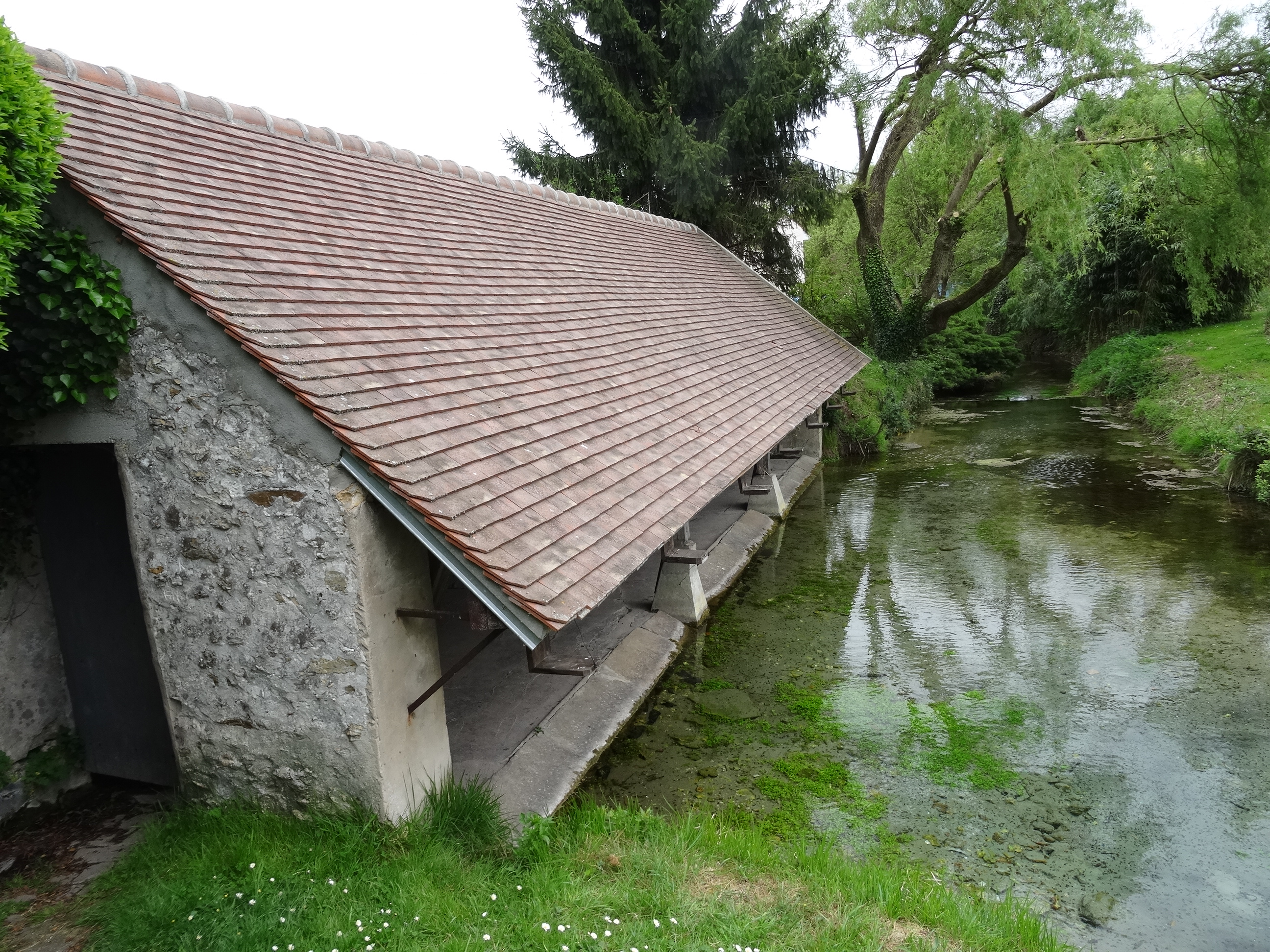 Lavoir à Souzy-la-Briche situé sur des sources alimentant la Renarde. (Essonne, région Île-de-France).